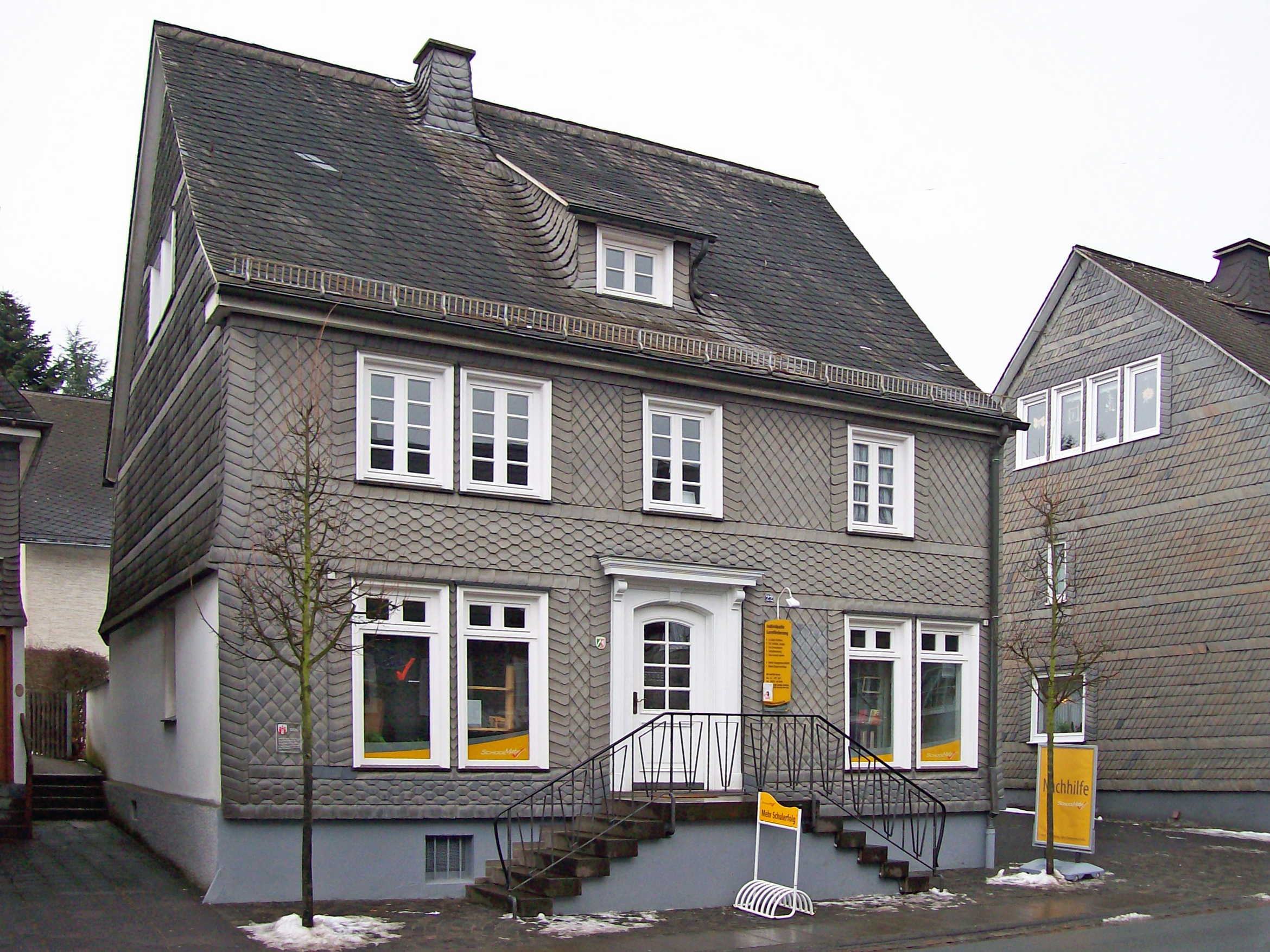 Denkmalgeschütztes Haus (Oststraße) im historischen Stadtkern von Schmallenberg, Germany.